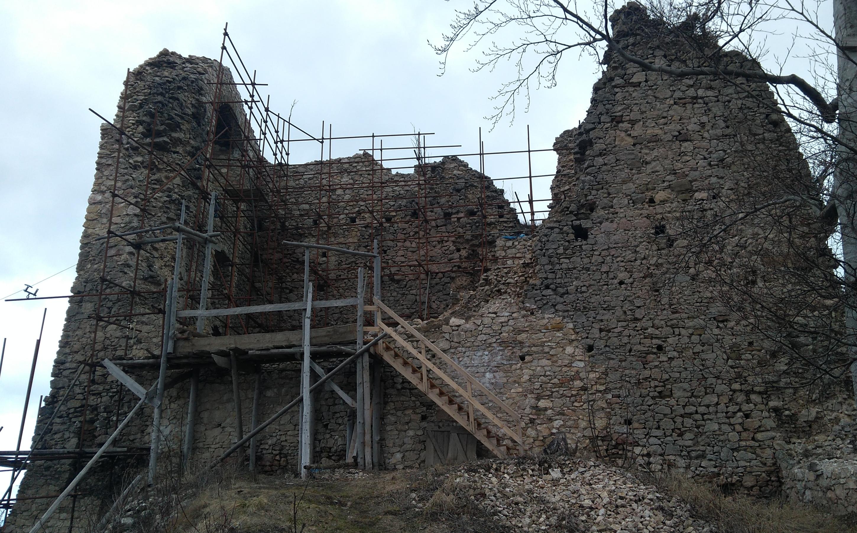 Horné nádvorie v rekonštrukcii